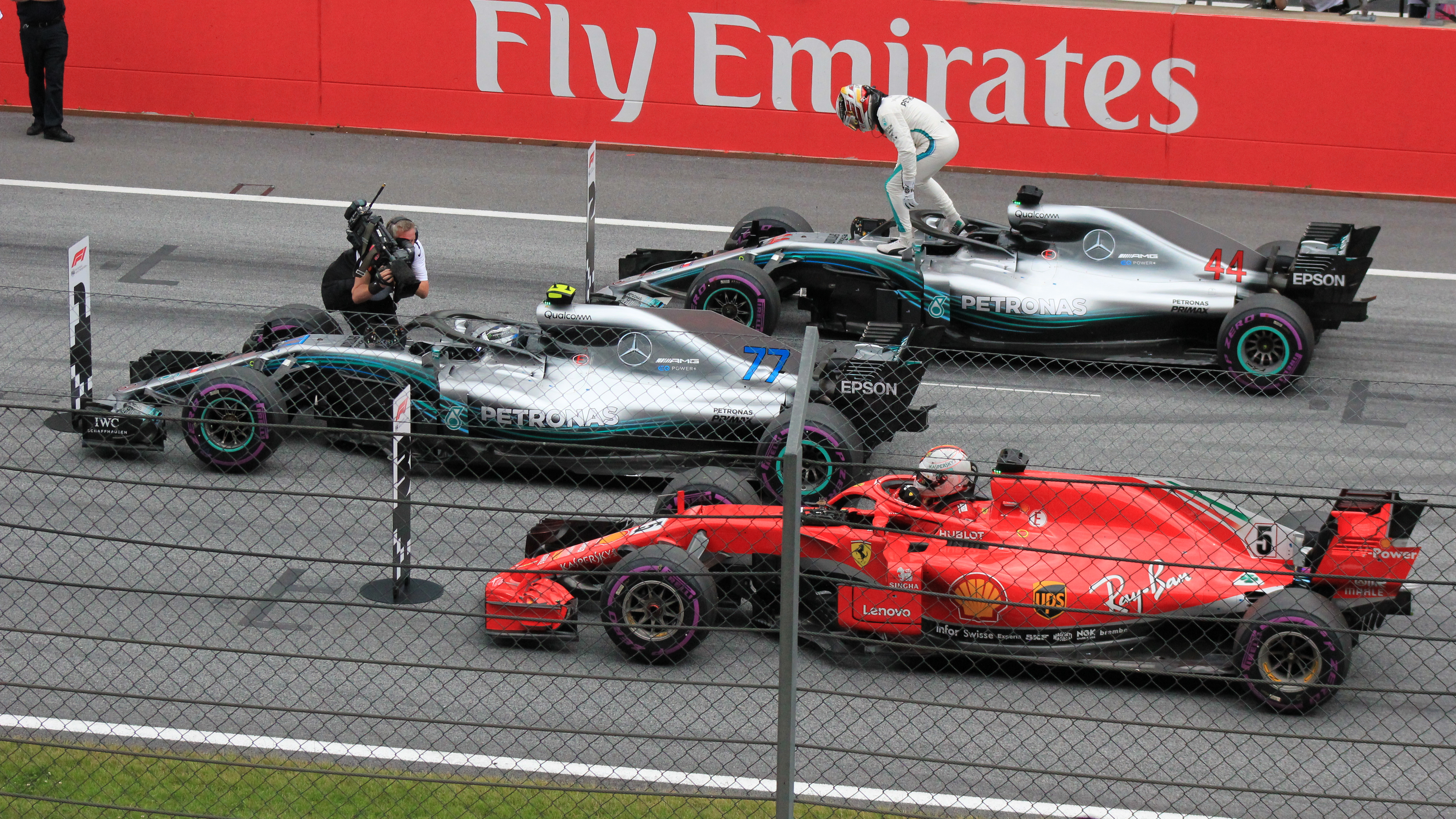 Die Top-3 des Qualifyings